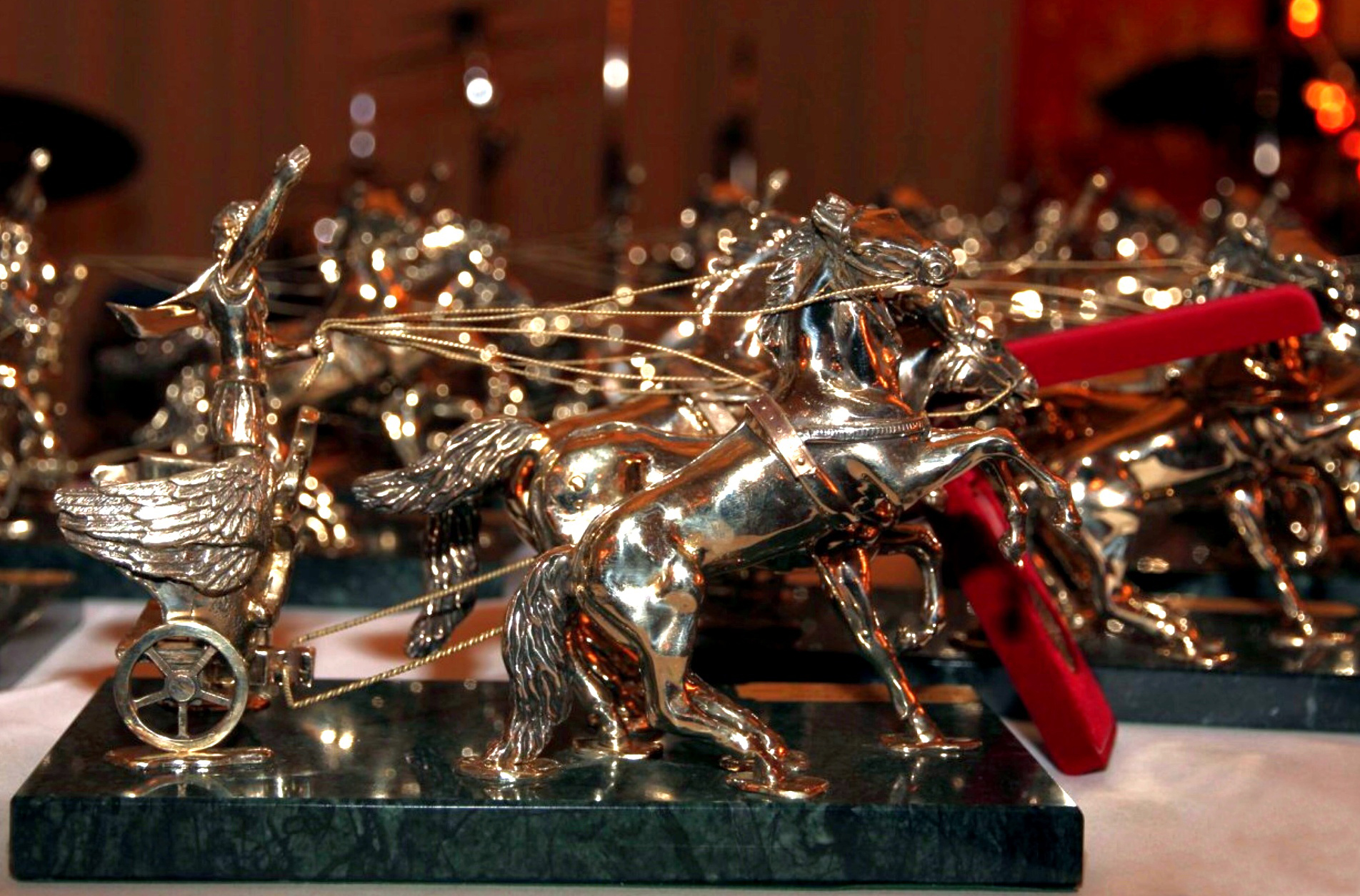 Статуэтки "Золотая Колесница"